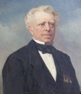 Portret van Mr. C.A de Jongh (1803-1873)